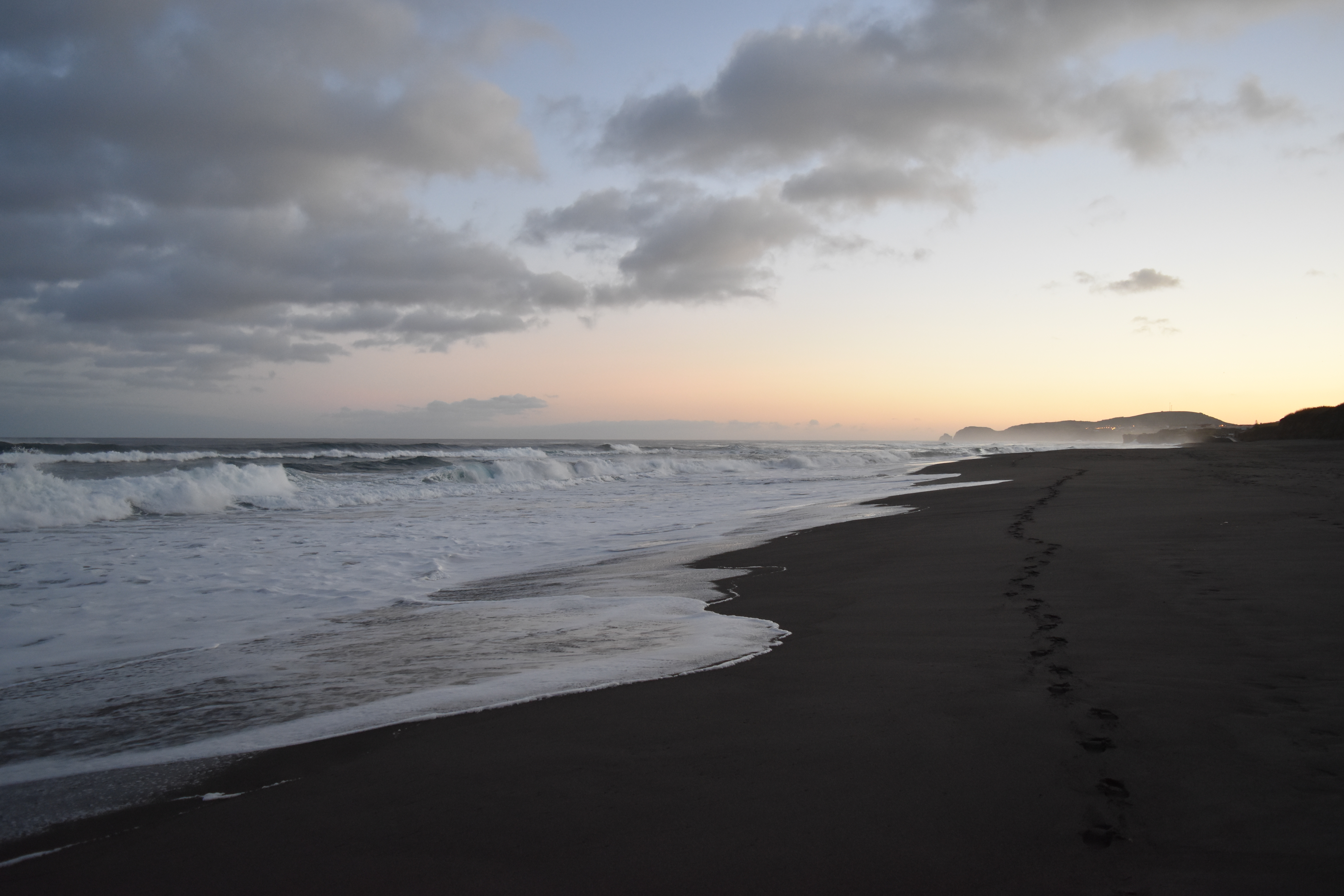 Santa Barbara Beach